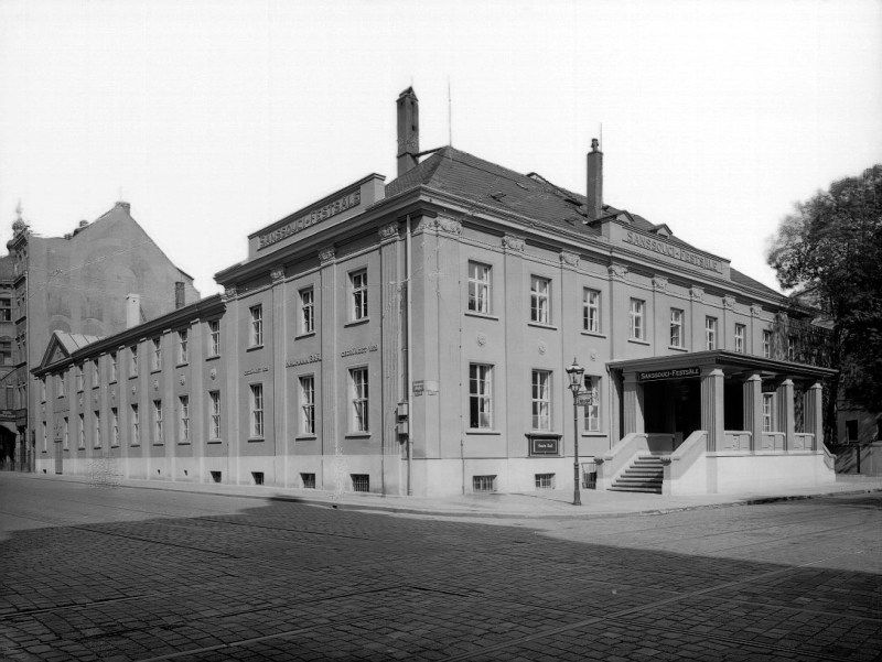 Sanssouci-Festsäle Leipzig, Elsterstraße 12, früher Odeon